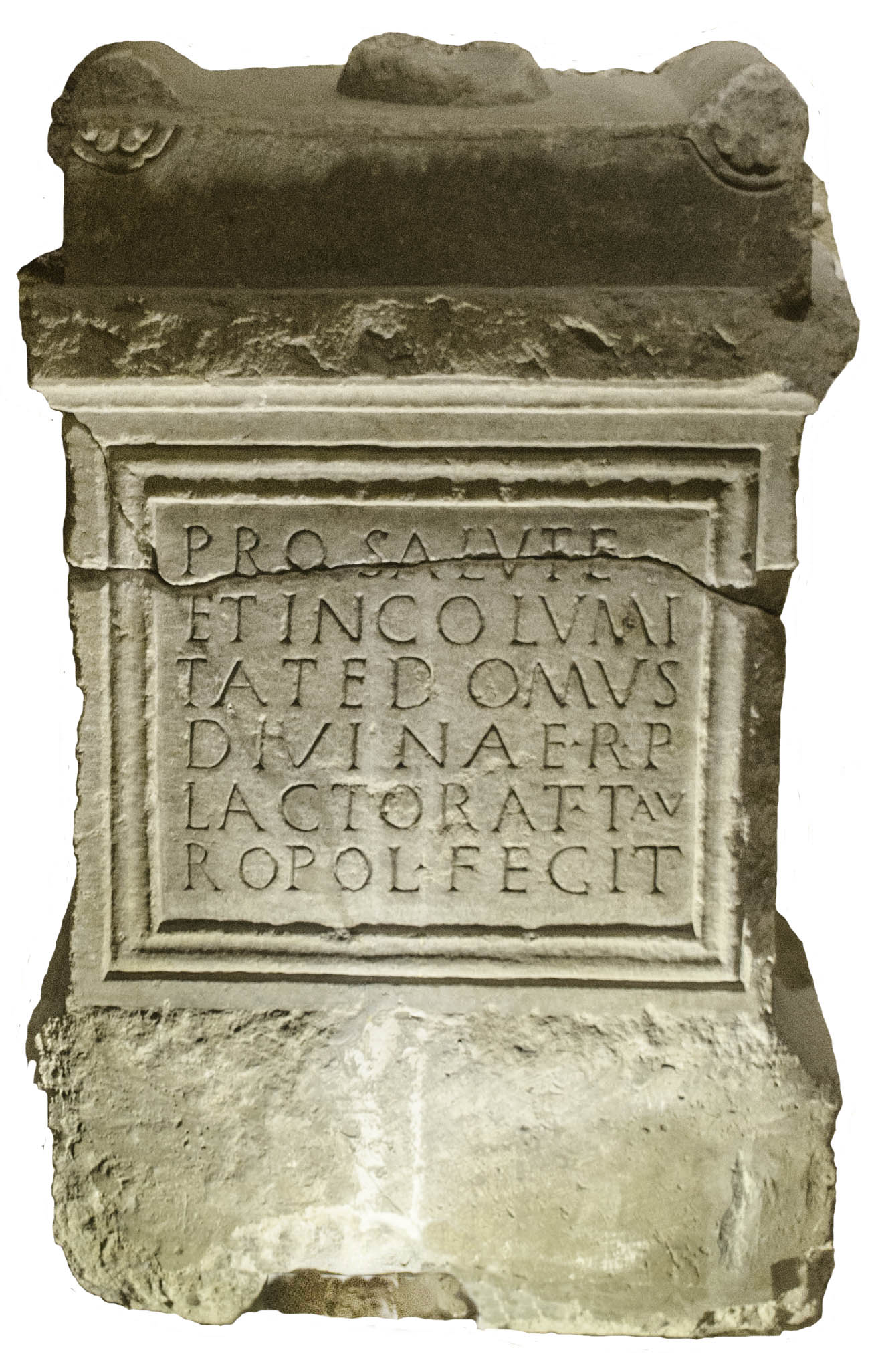 Autel taurobolique des Lactorates pour le salut de la famille impériale. Musée Eugène-Camoreyt de Lectoure, Gers, France.